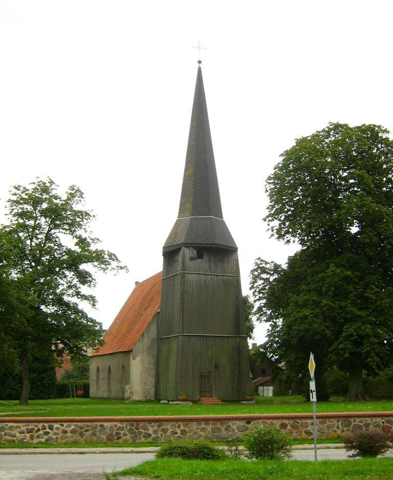 Die Dorfkirche in Siedenbollentin bei Altentreptow (Vorpommern, Landkreis Mecklenburgische Seenplatte).